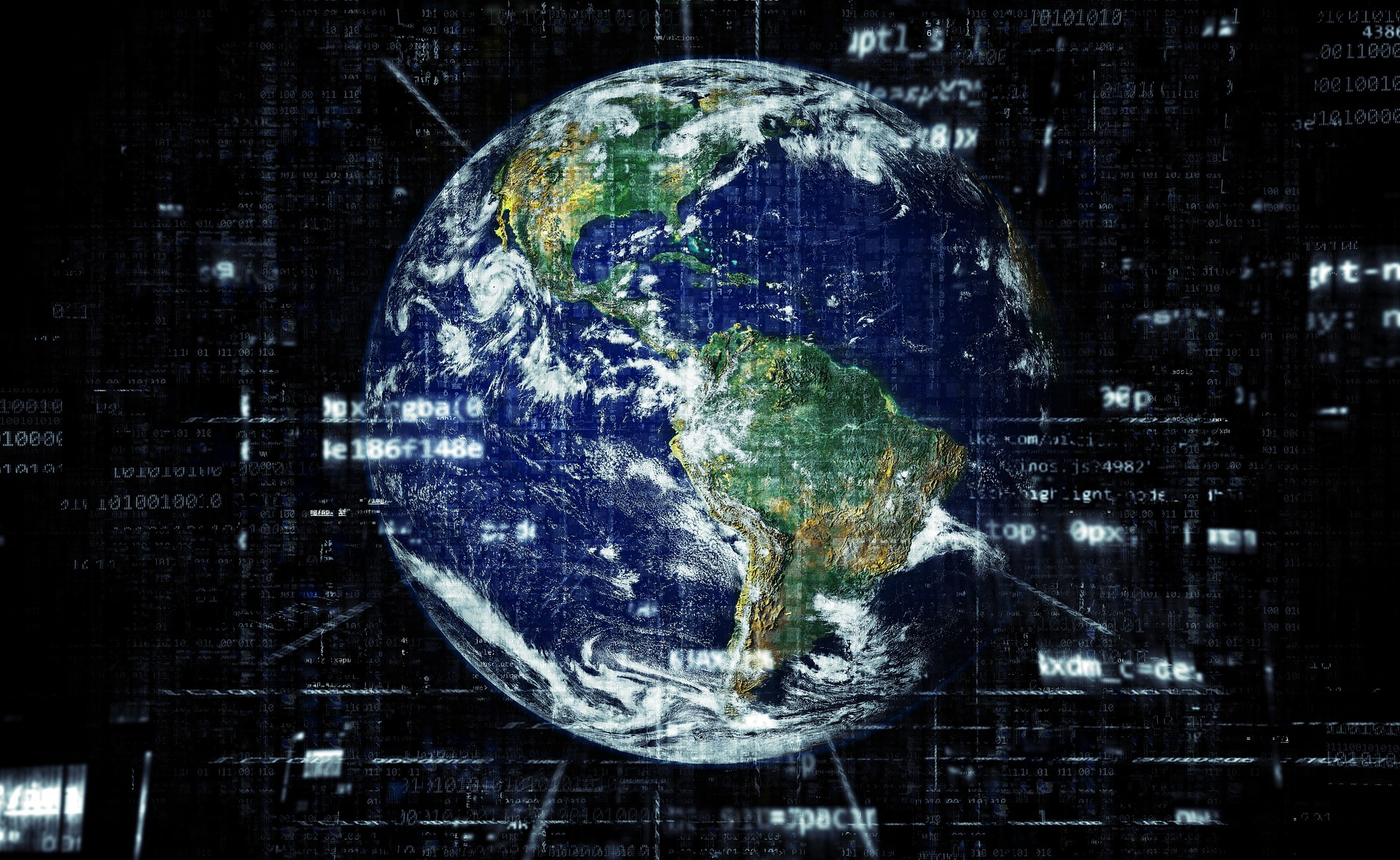 globalisasi